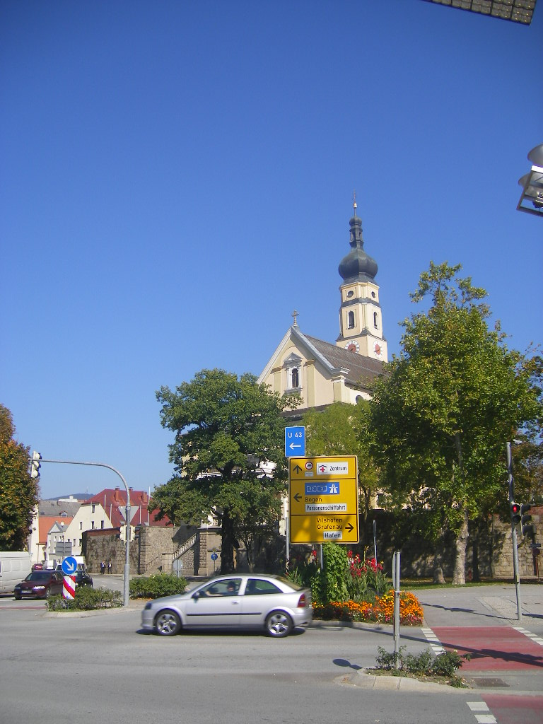 Deggendorf